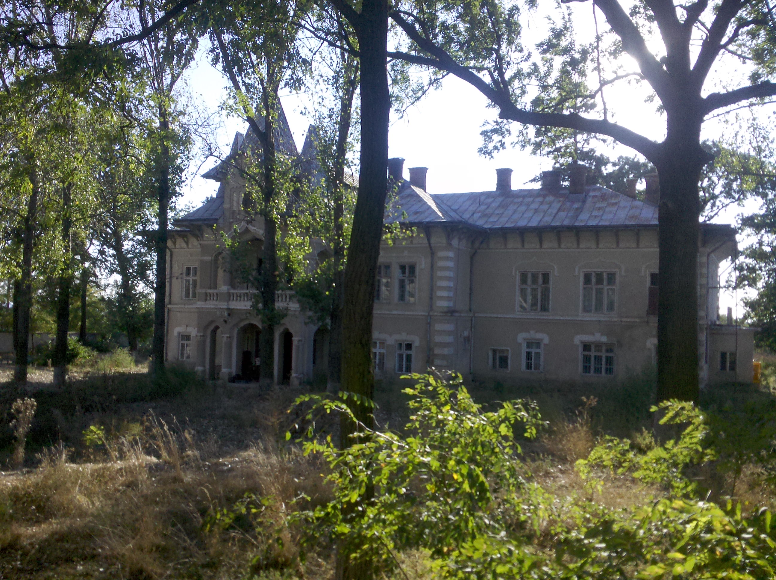 el ex hospital de Siquiatria de Gâdinţi cerca de Roman, Rumania